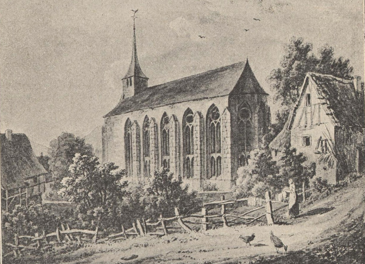 Klosterkirche Marienthal (Pfalz), 1830